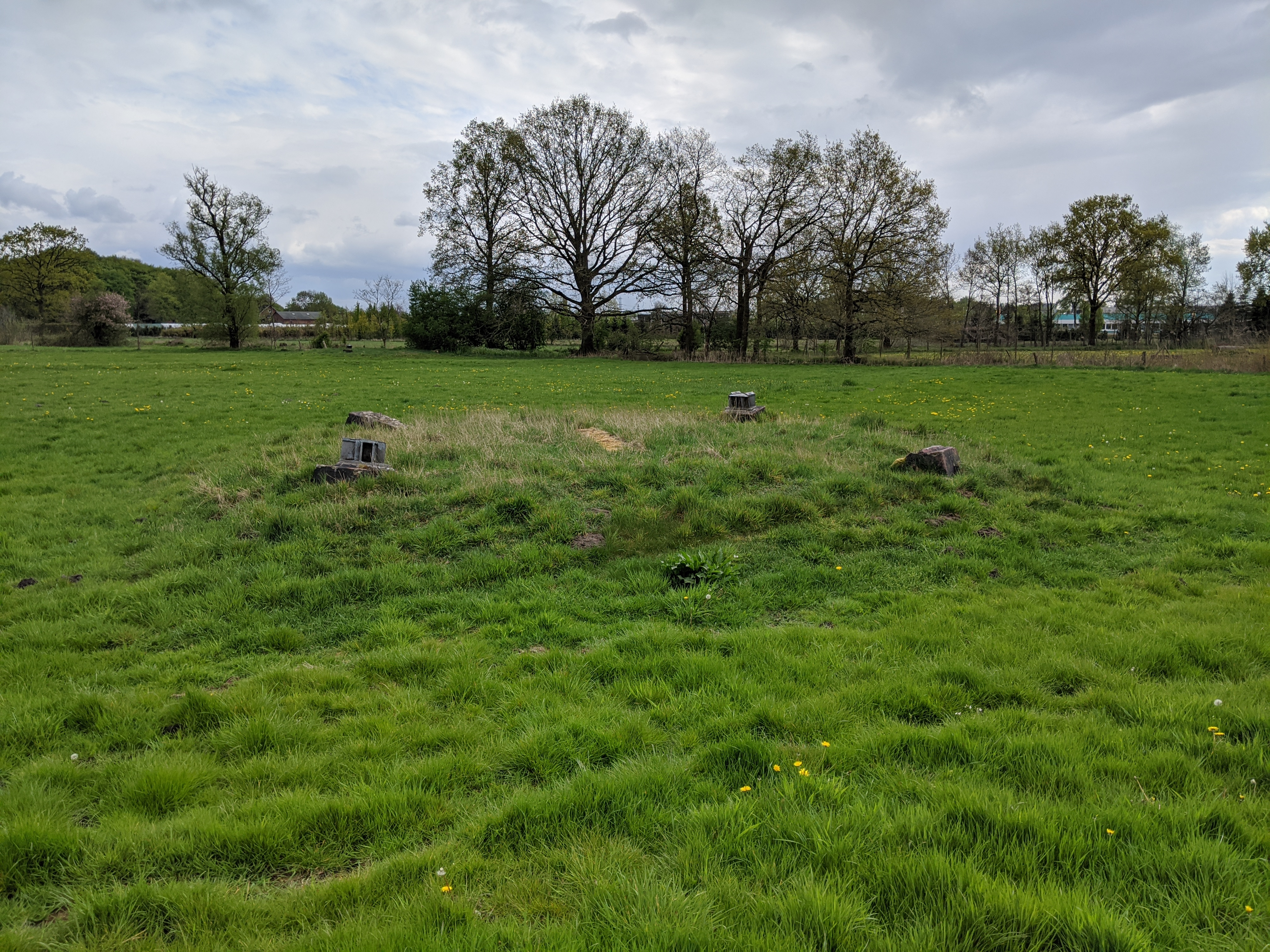 Sendefunkstelle Elmshorn, Reste Funkmastfundamente, weitere Ansicht